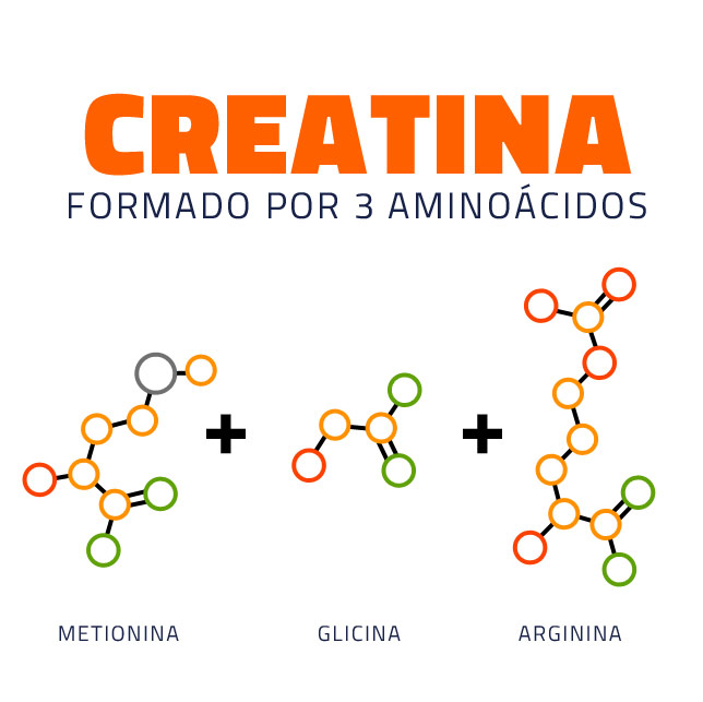 Imagen donde se muestran los tres aminoácidos que forma la molécula de creatina